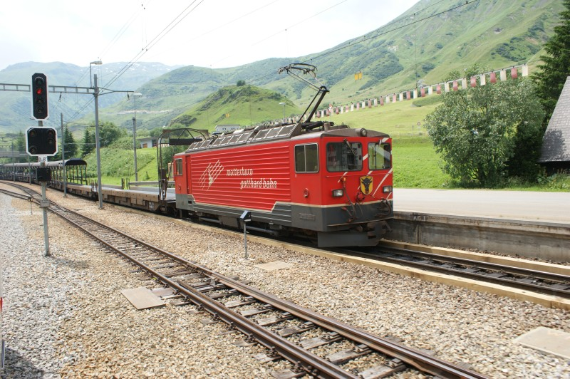 Station Realp im Kanton Uri mit Lok Ge 4/4 III 82 der MGB mit Urner Wappen vor Furka-Autozug, daneben Hauptsignal mit Vorsignal und Zugsicherung ZSI-90